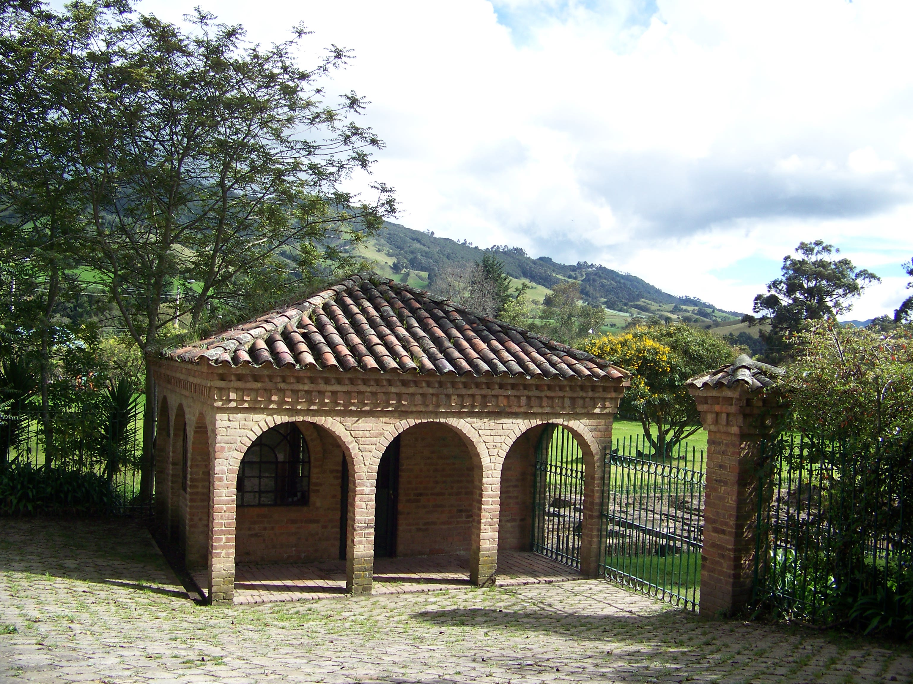 Antigua Ferrería de La Pradera